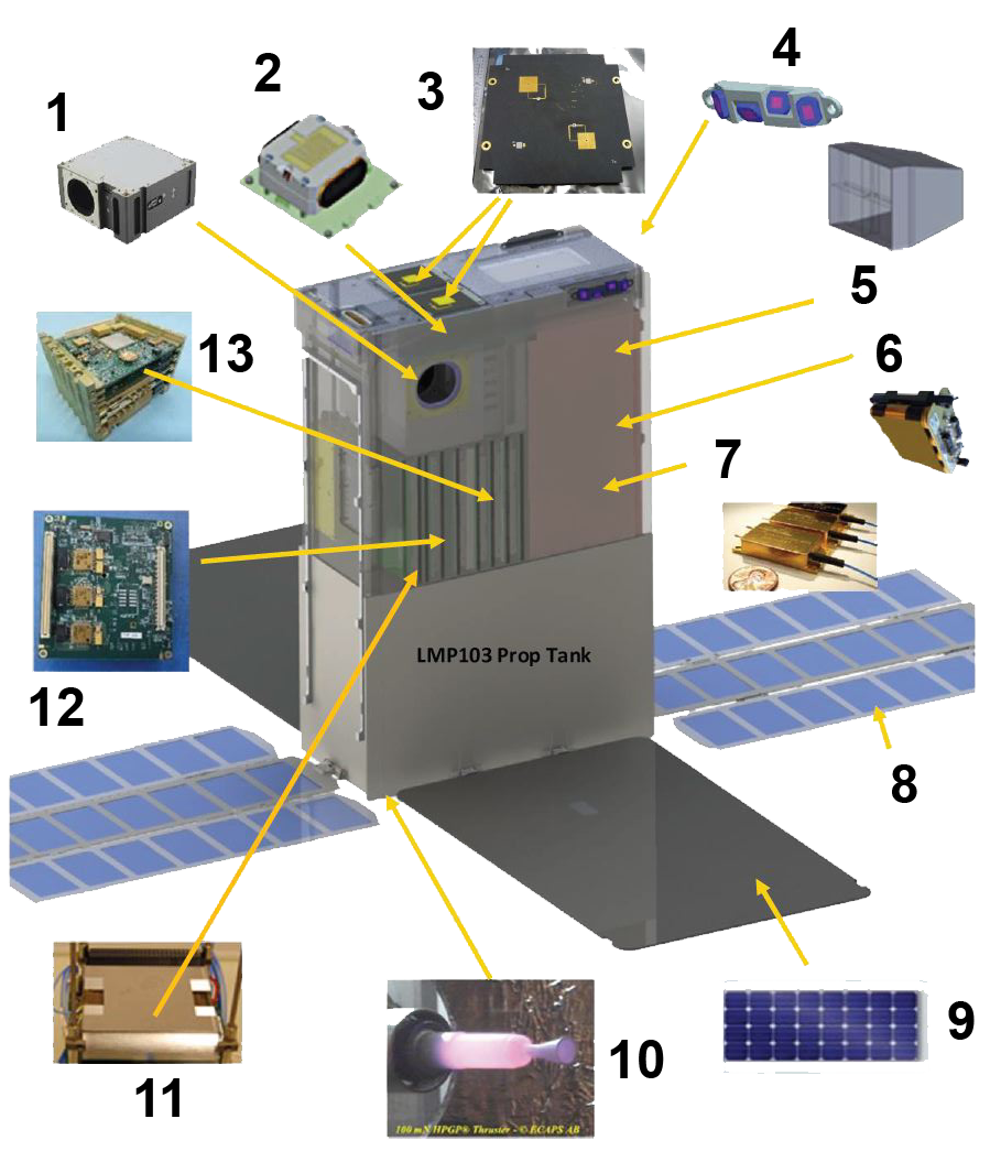 Lunar Flashlight CubeSat witthout labels